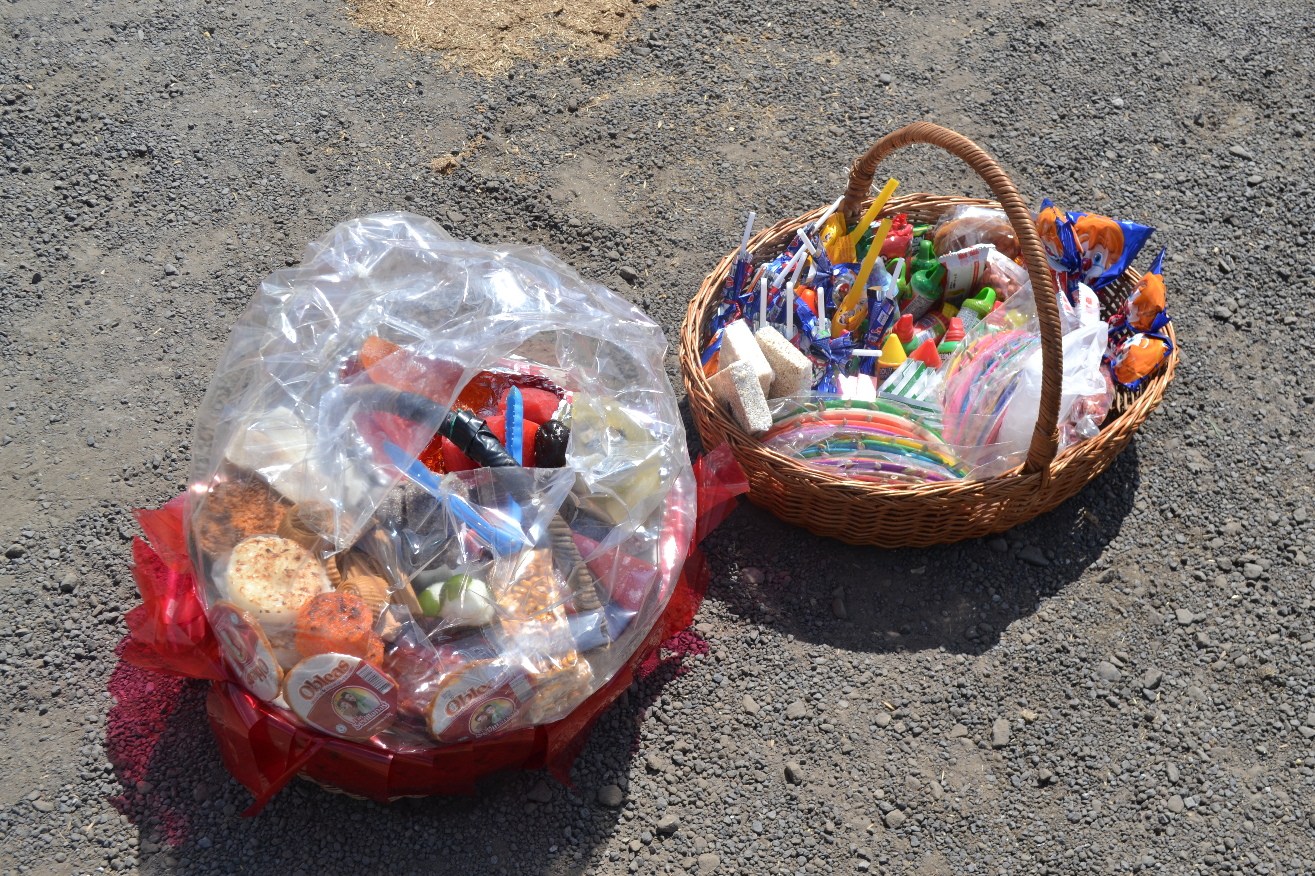 venta de dulces y juguetes mexicanos